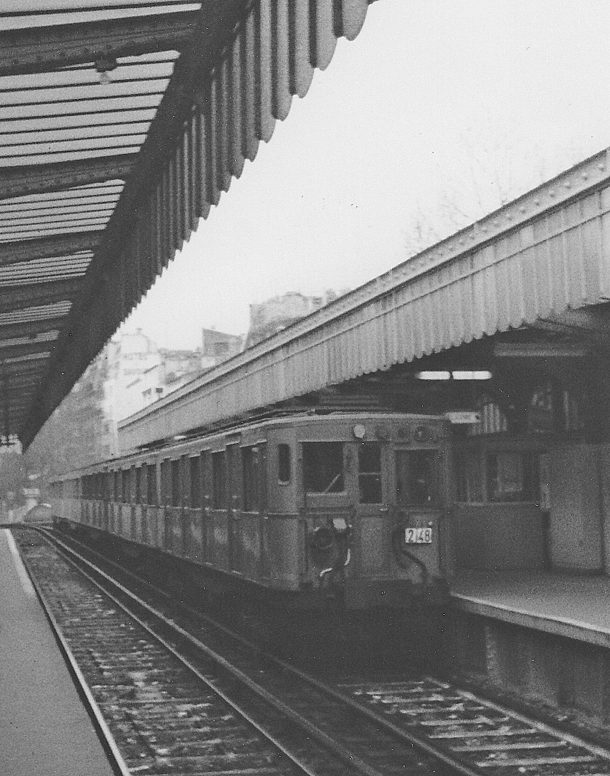 Sprague-Thomson Triebwagen der Métro Paris am 22.03.1978 auf der Linie 2.